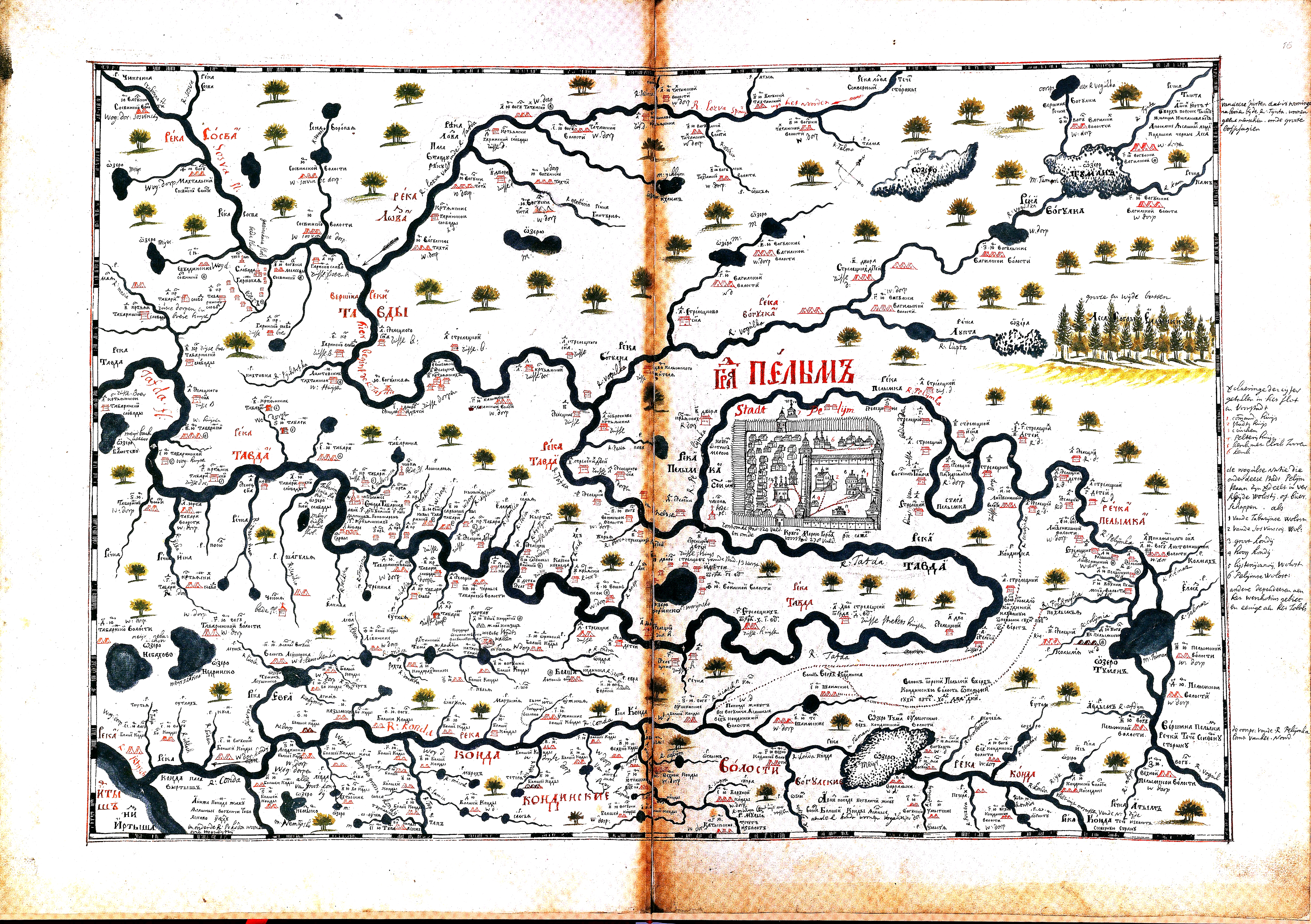 Карта города Пелым с окрестностями конца XVII века из "Чертежной книги Сибири, составленной тобольским сыном боярским Семеном Ремезовым в 1701 г.", - СПБ, 1882